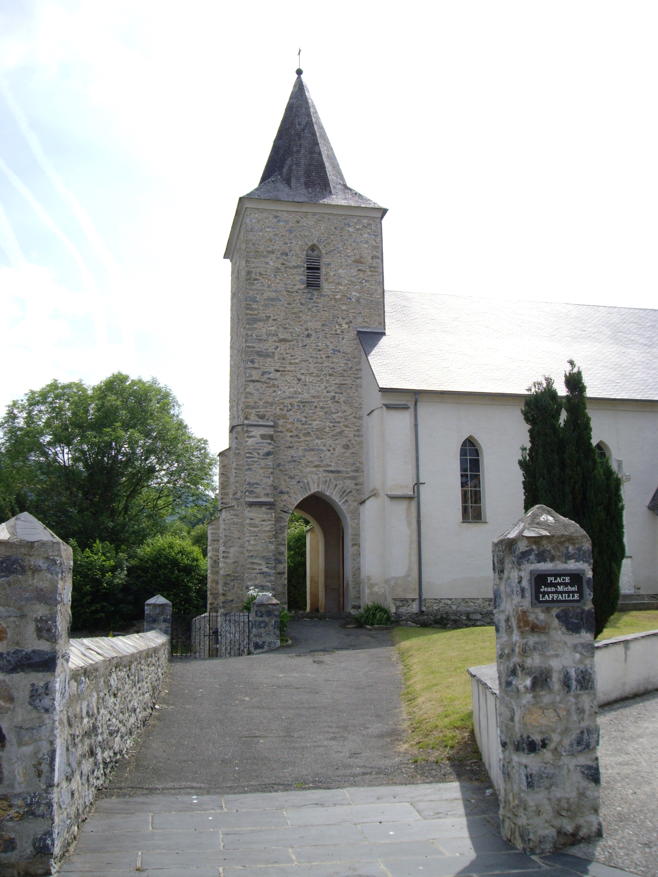 Église Saint-Jacques de Germs-sur-l'Oussouet (Hautes-Pyrénées, France).